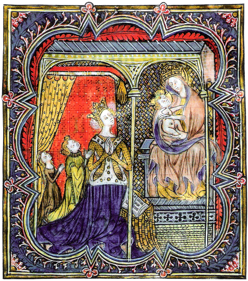 Yolande d'Aragon et deux de ses enfants en prière devant la Vierge à l'Enfant, enluminure anonyme dans le Juratoire et livre des fondations de la chapelle royale du Gué-de-Maulny dans le Maine (ms. 691, folio 16, Bibliothèque municipale, Le Mans).